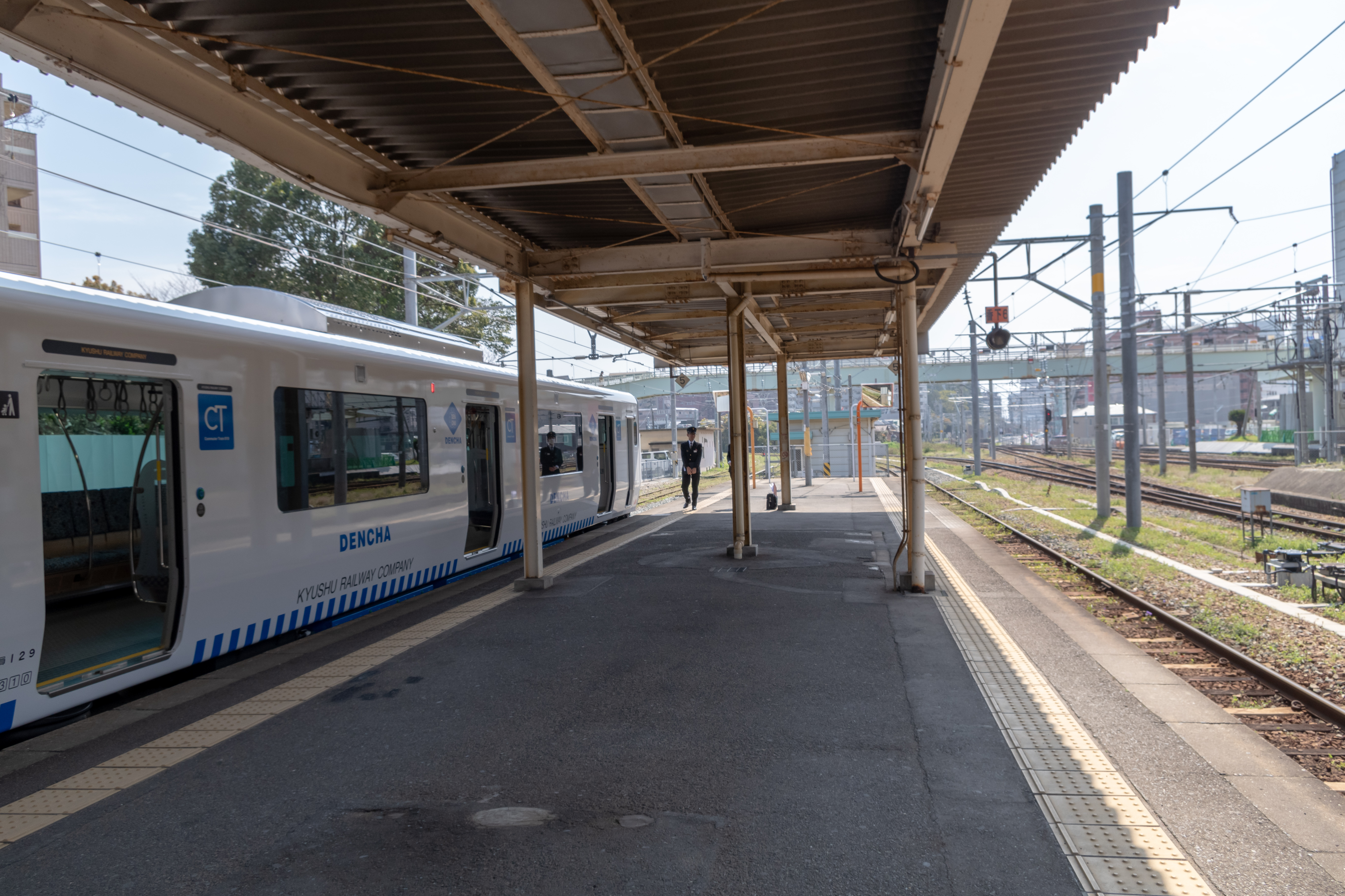 香椎駅4・5番線ホーム